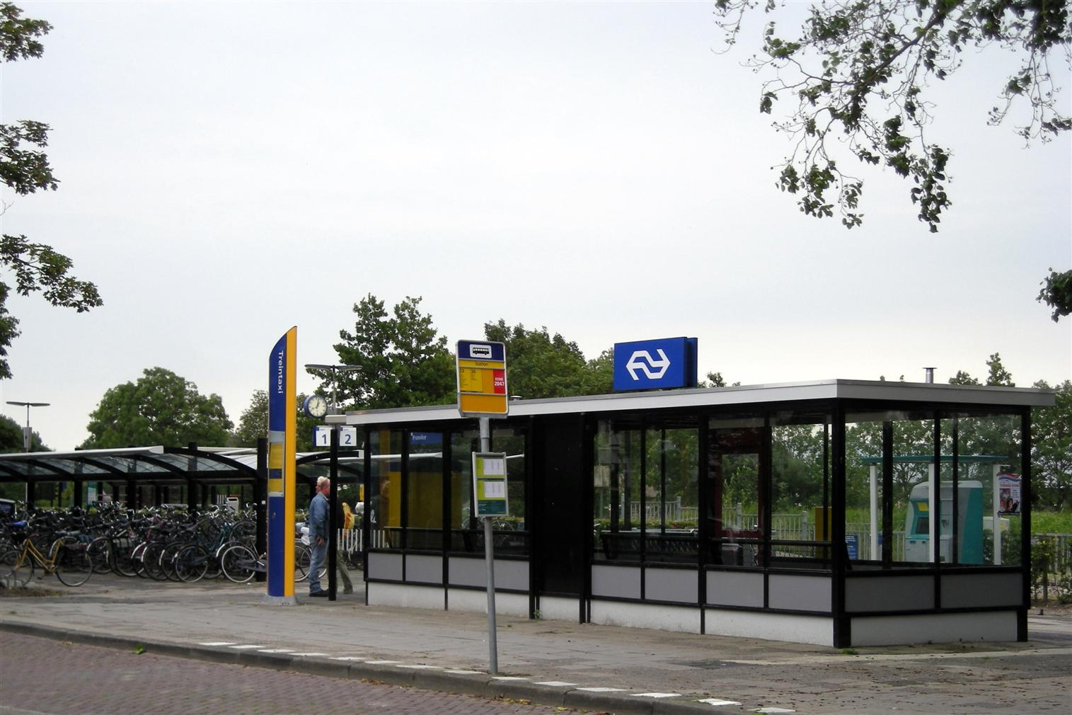 Stasjon Frjentsjer